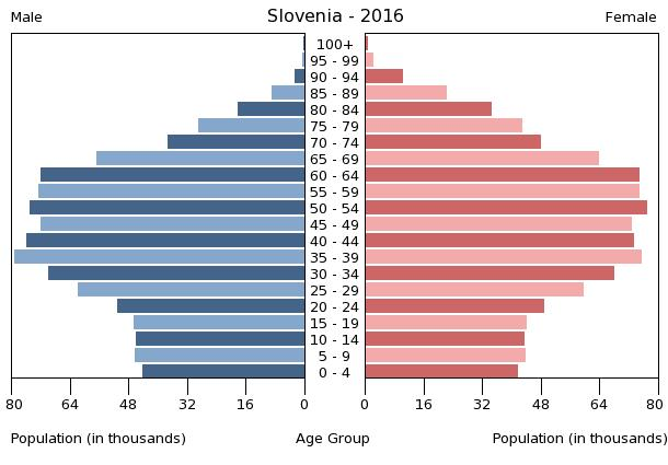 A population pyramid illustrates the age and sex structure of a country's population and may provide insights about political and social stability, as well as economic development. The population is distributed along the horizontal axis, with males shown on the left and females on the right. The male and female populations are broken down into 5-year age groups represented as horizontal bars along the vertical axis, with the youngest age groups at the bottom and the oldest at the top. The shape of the population pyramid gradually evolves over time based on fertility, mortality, and international migration trends.